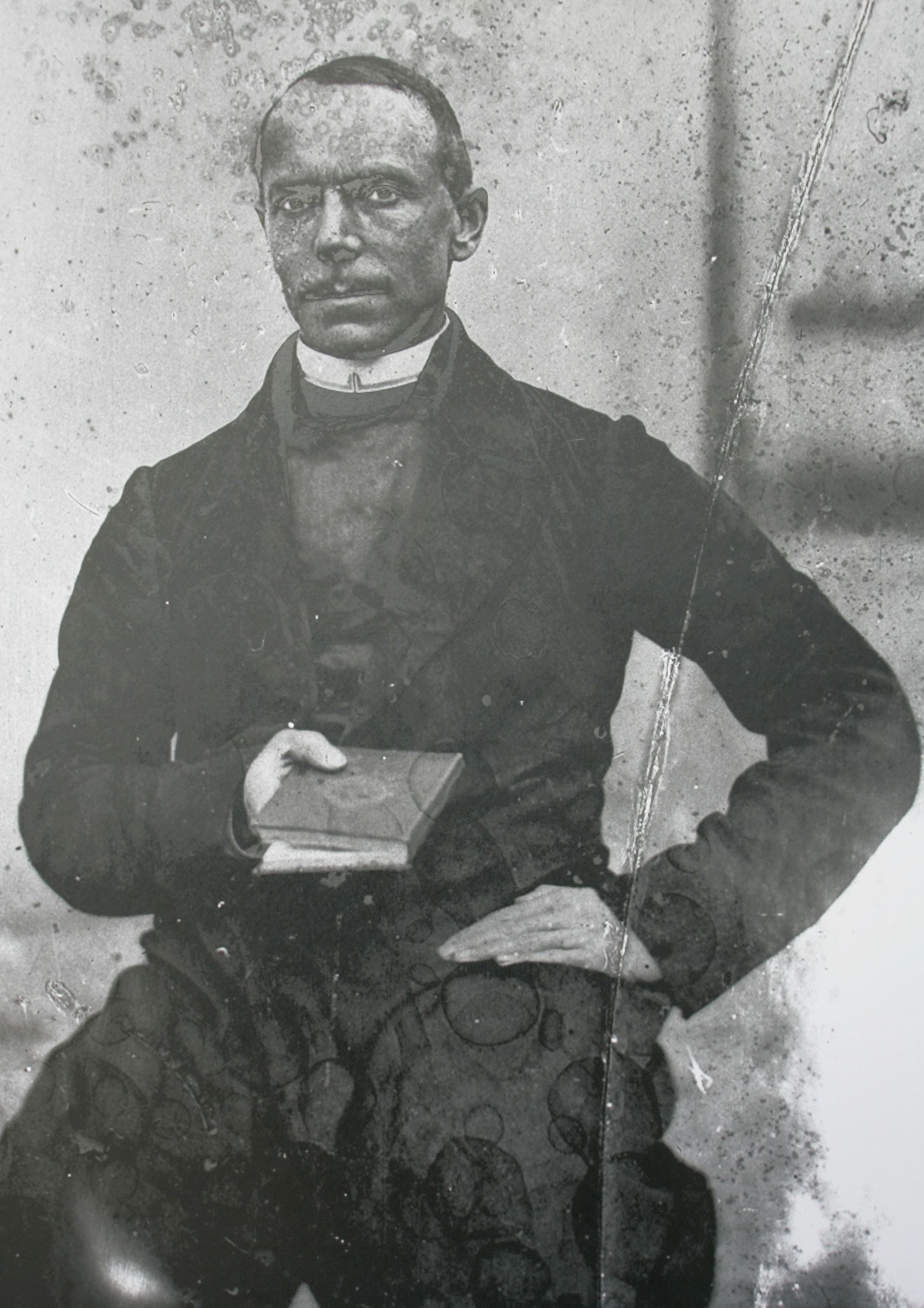 Self-portrait